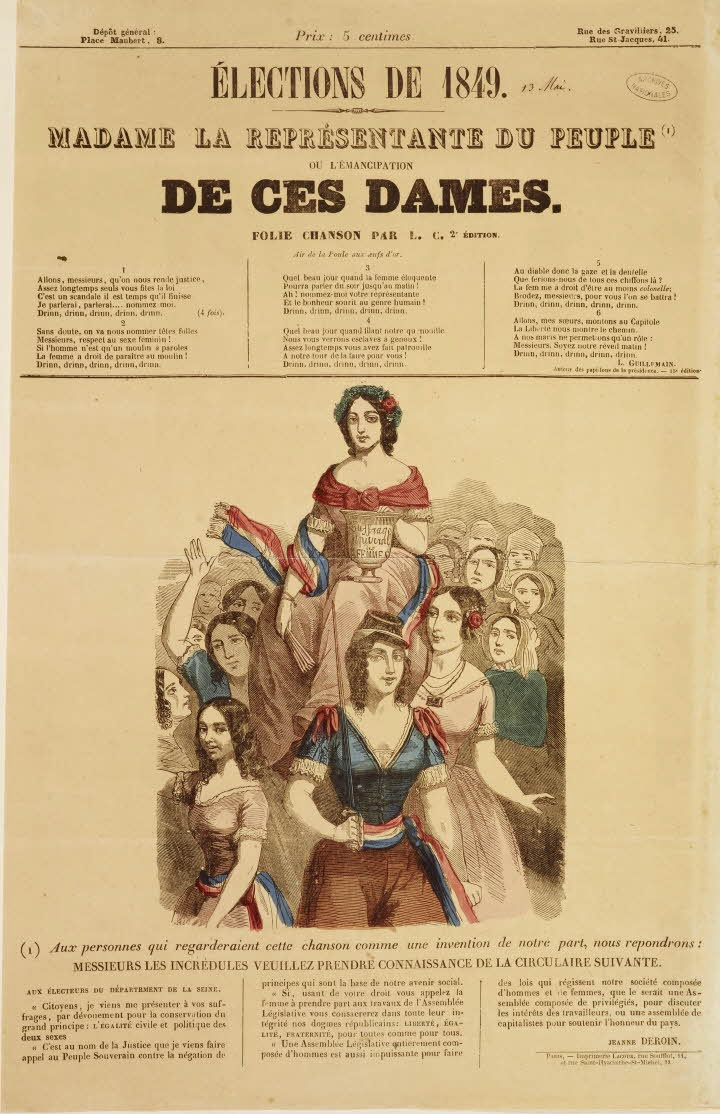 Elections de 1849 / madame la representante du peuple / de l'emancipation / de ces dames.